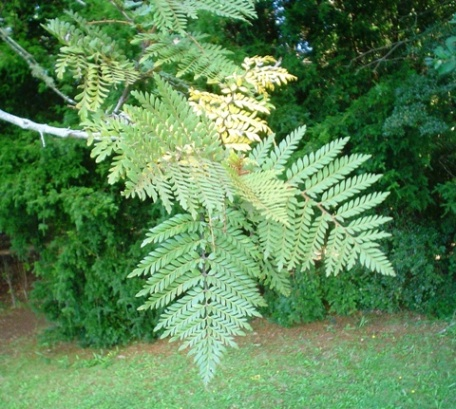 Rama de huinque o fuinque (Lomatia ferruginea) mostrando el haz de las hojas. Isla Teja, Valdivia, Chile)